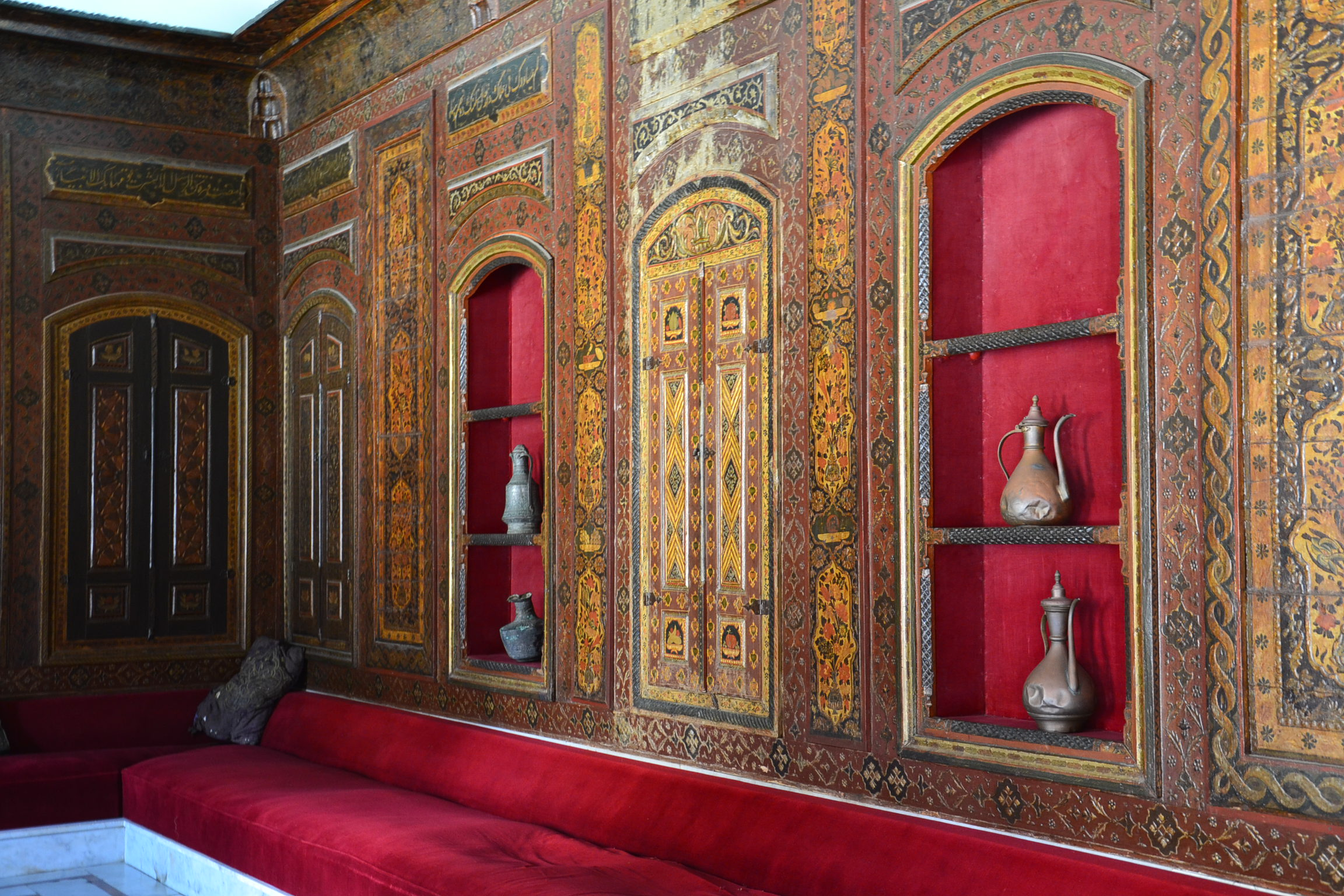 Palais de Beiteddine - Vue d'un salon